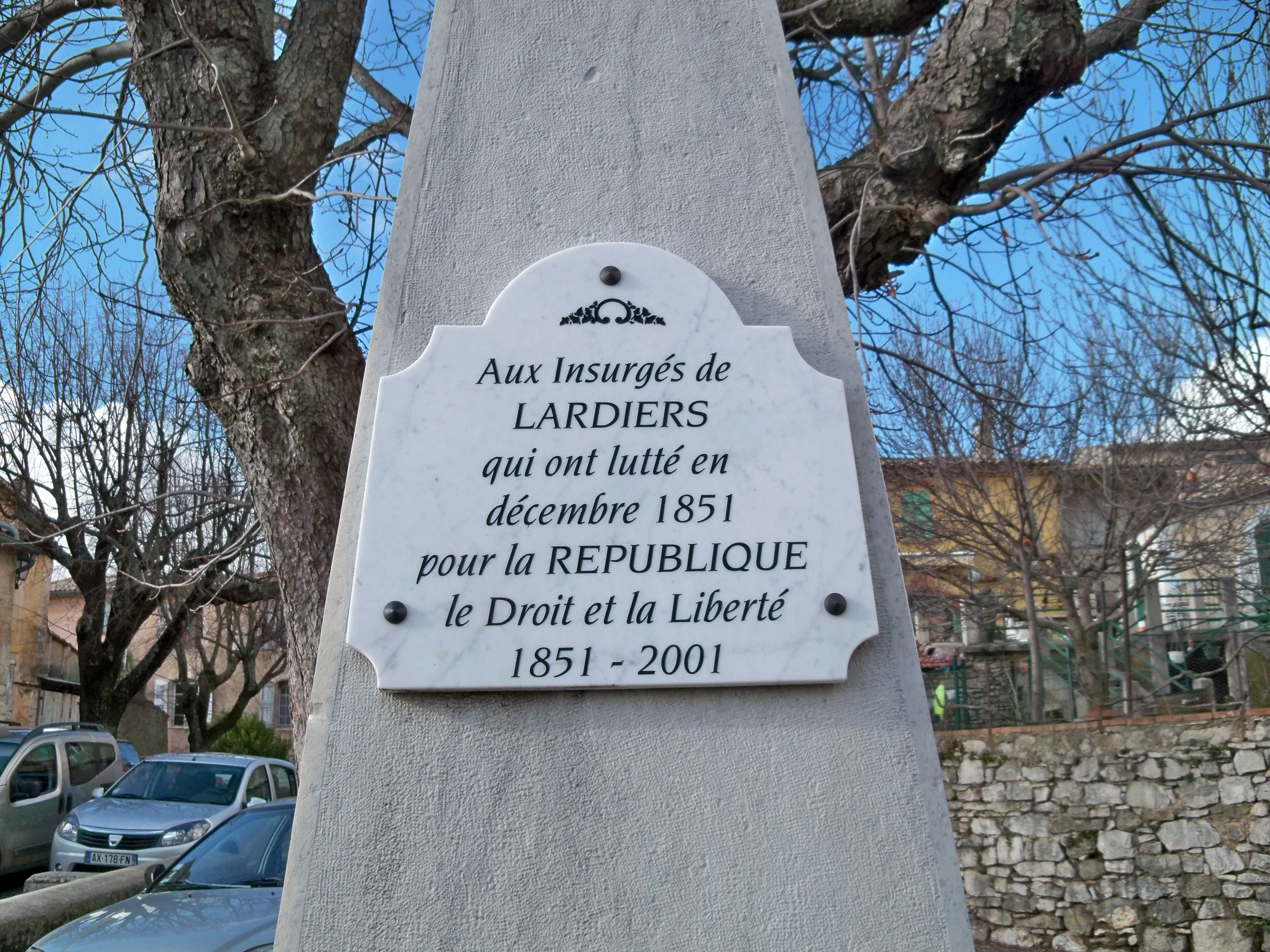 détail monuments aux morts de Lardiers, Alpes de Haute Provence, France